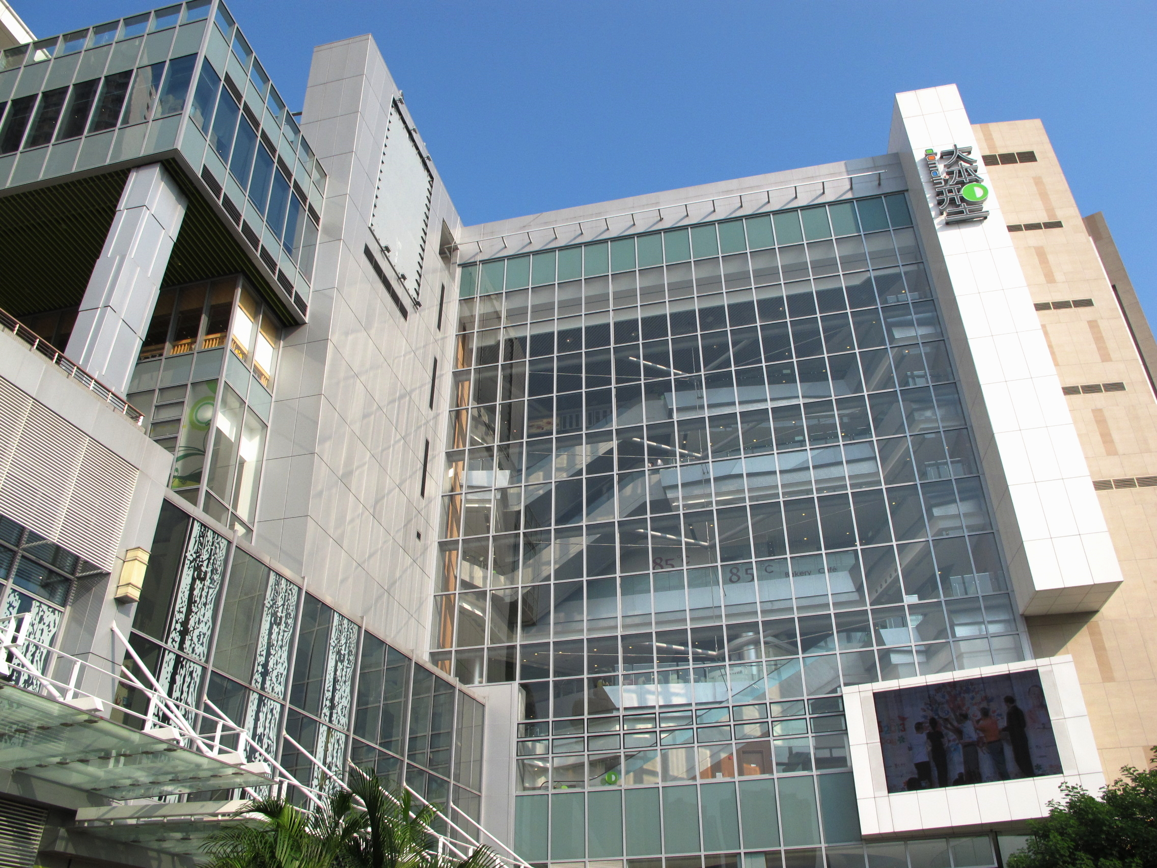 Domain Mall